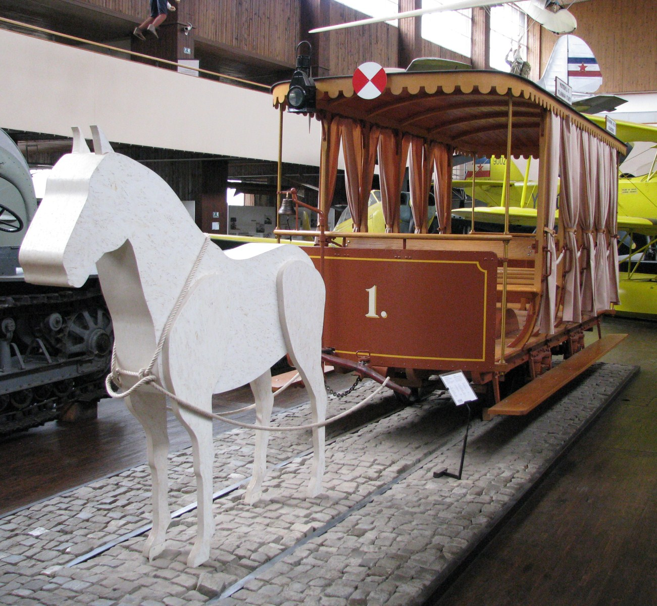 Replika zagrebačkog konjskog tramvaja iz 1891. godine u Tehničkom muzeju u Zagrebu